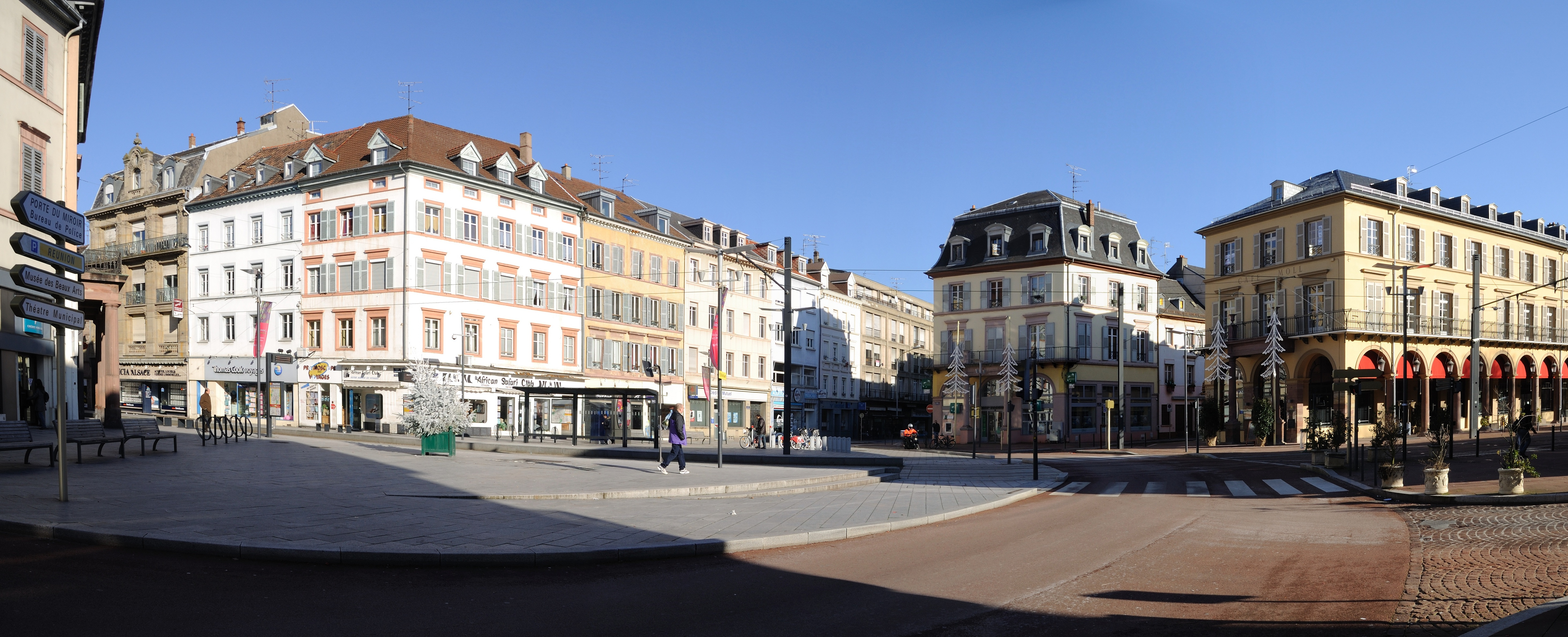 Mulhouse: Place de la République